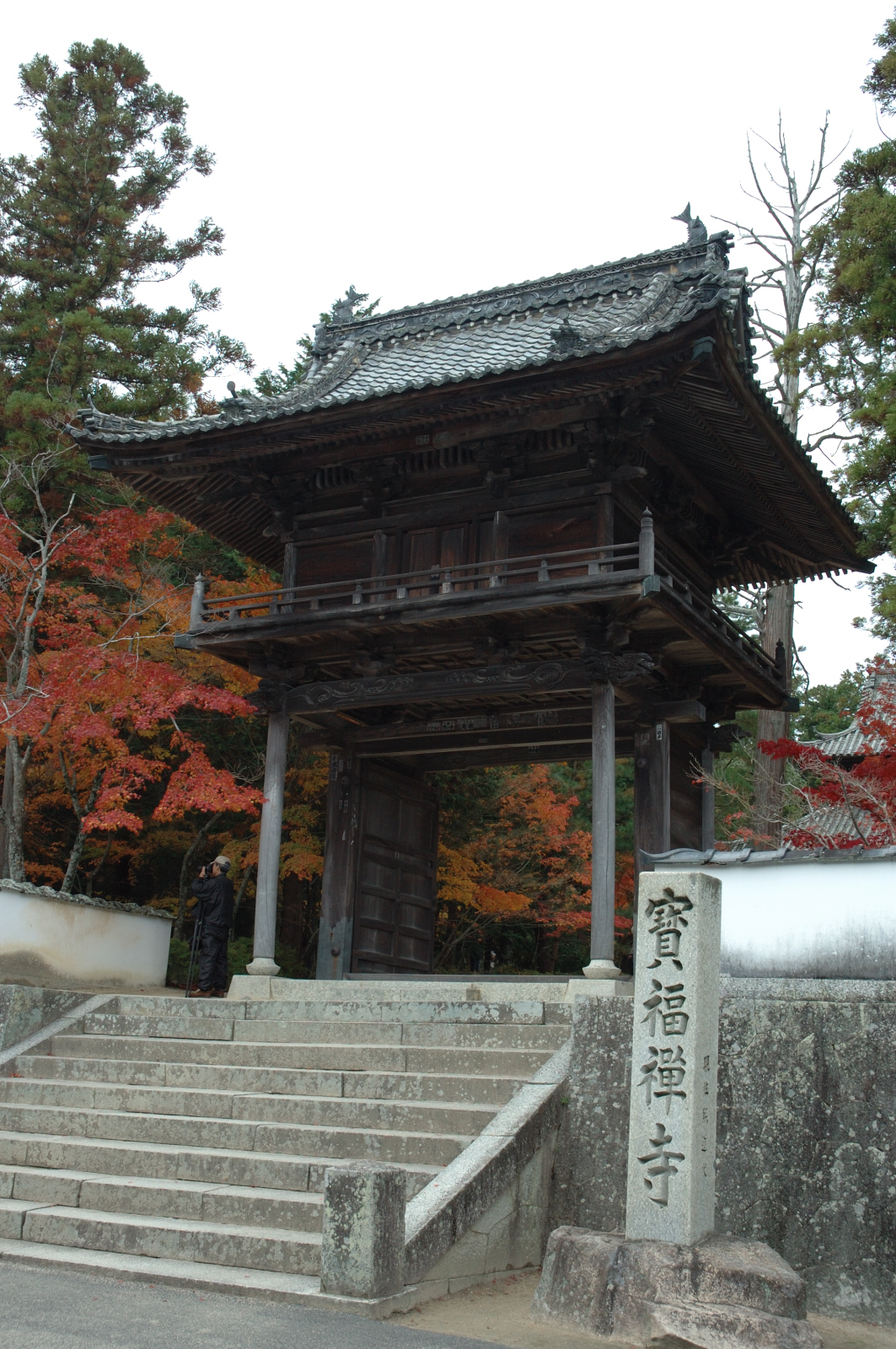 Gate of Hofukuji